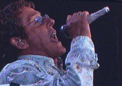 none